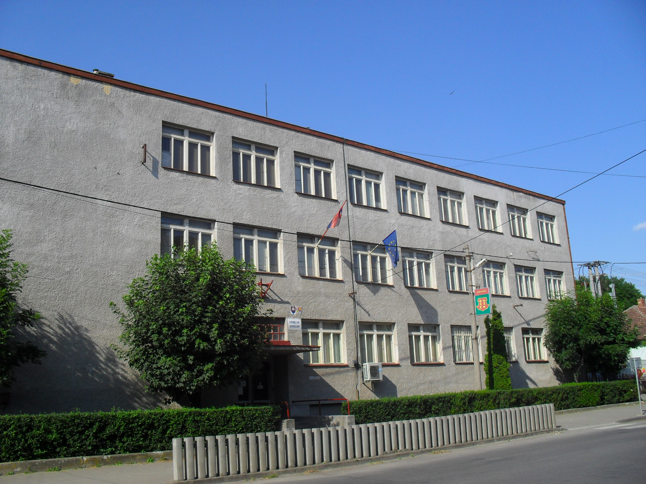 Nagykapos - gimnázium